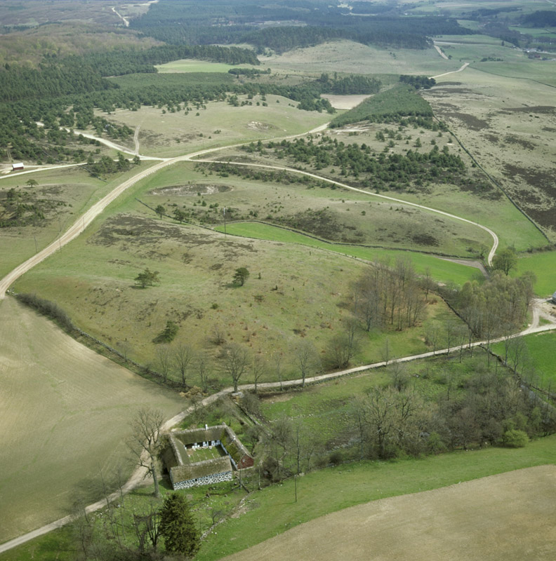 Från norr, Glimmebodagården i bildens nedre kant Motiv: Brösarp Glimmeboda Nyckelord: Byggnadsminnen, Flygbilder Kategori: Bondgård Från norr, Glimmebodagården i bildens nedre kant.